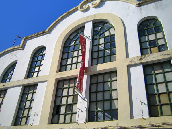 La Fàbrica de Sabó, centre cultural de El Verger, Marina Alta, País Valencià.